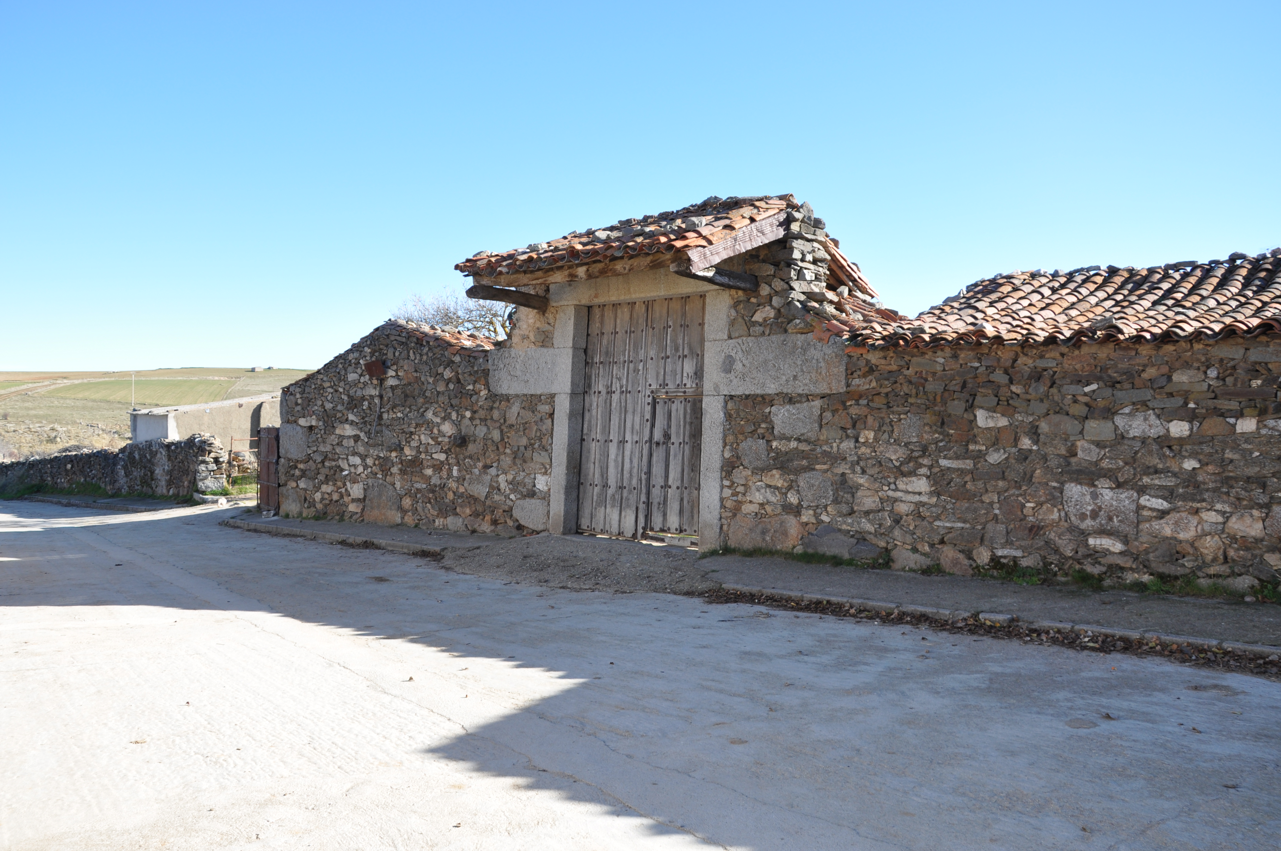 Portalón en Gallegos de Sobrinos, Ávila, España.